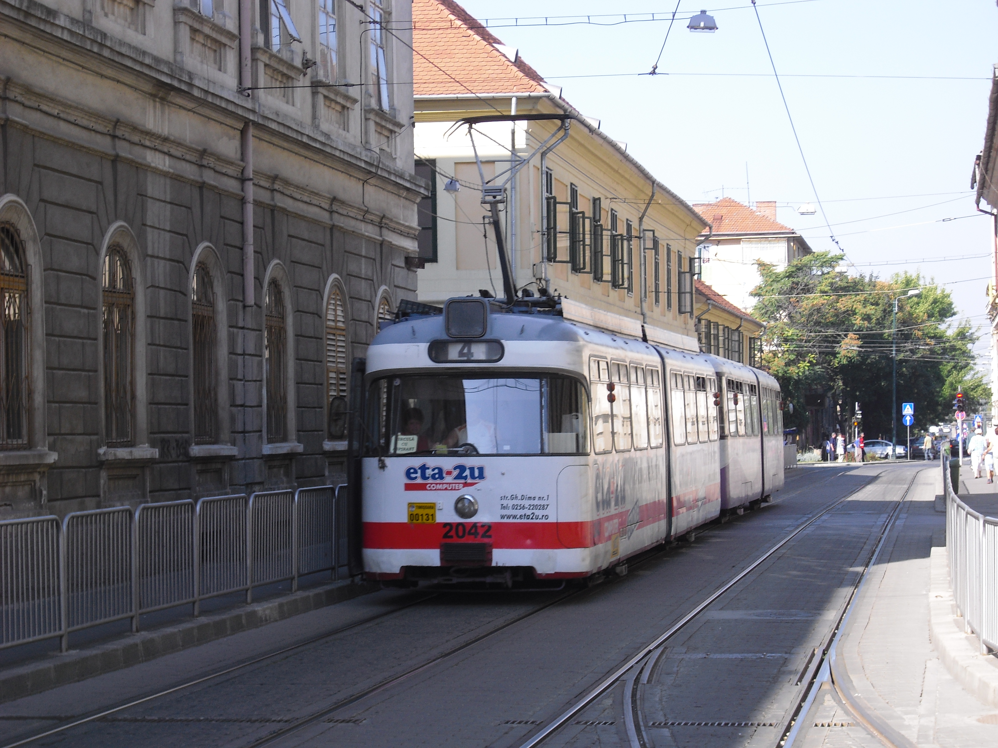 Straßenbahn in Timişoara (Rumänien)